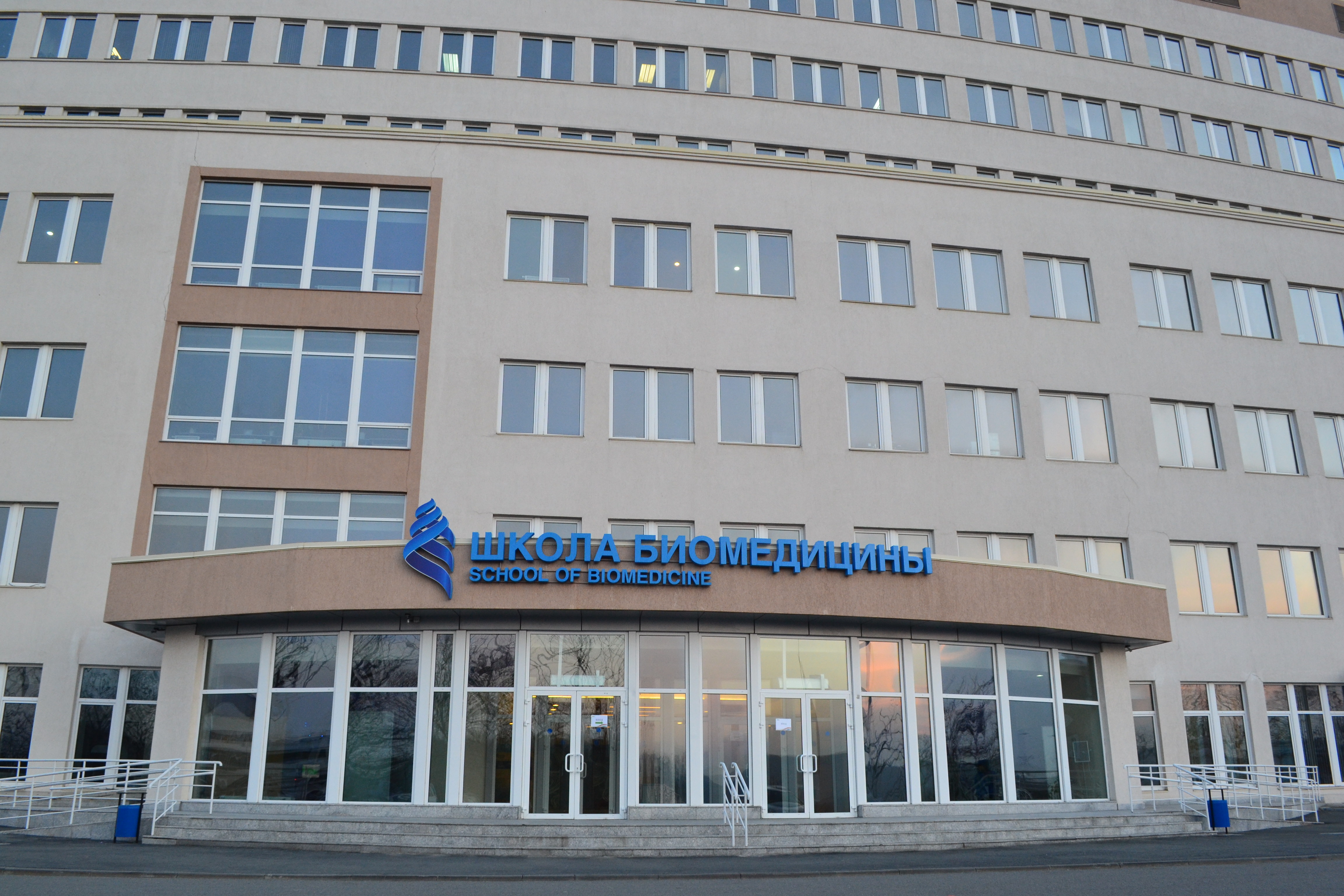 Школы биомедицины ДВФУ (фасад)